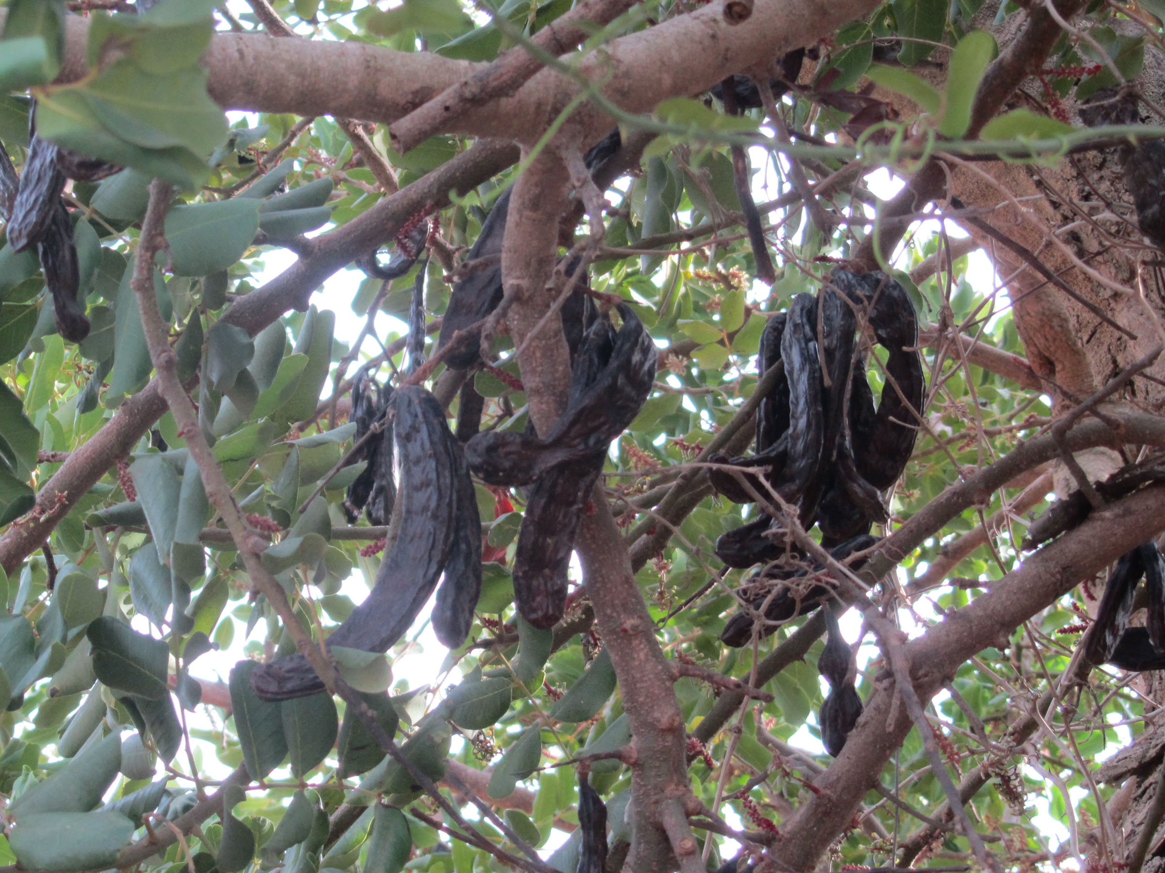 Fruits de Caroupier sur l'arbre